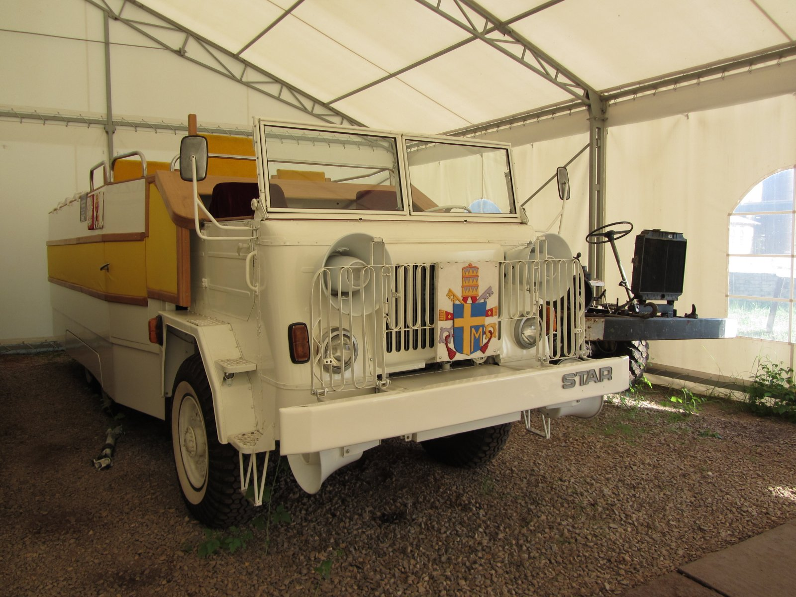 Muzeum Przyrody i Techniki w Starachowicach Konstrukcja odrestaurowana, nieoryginalna